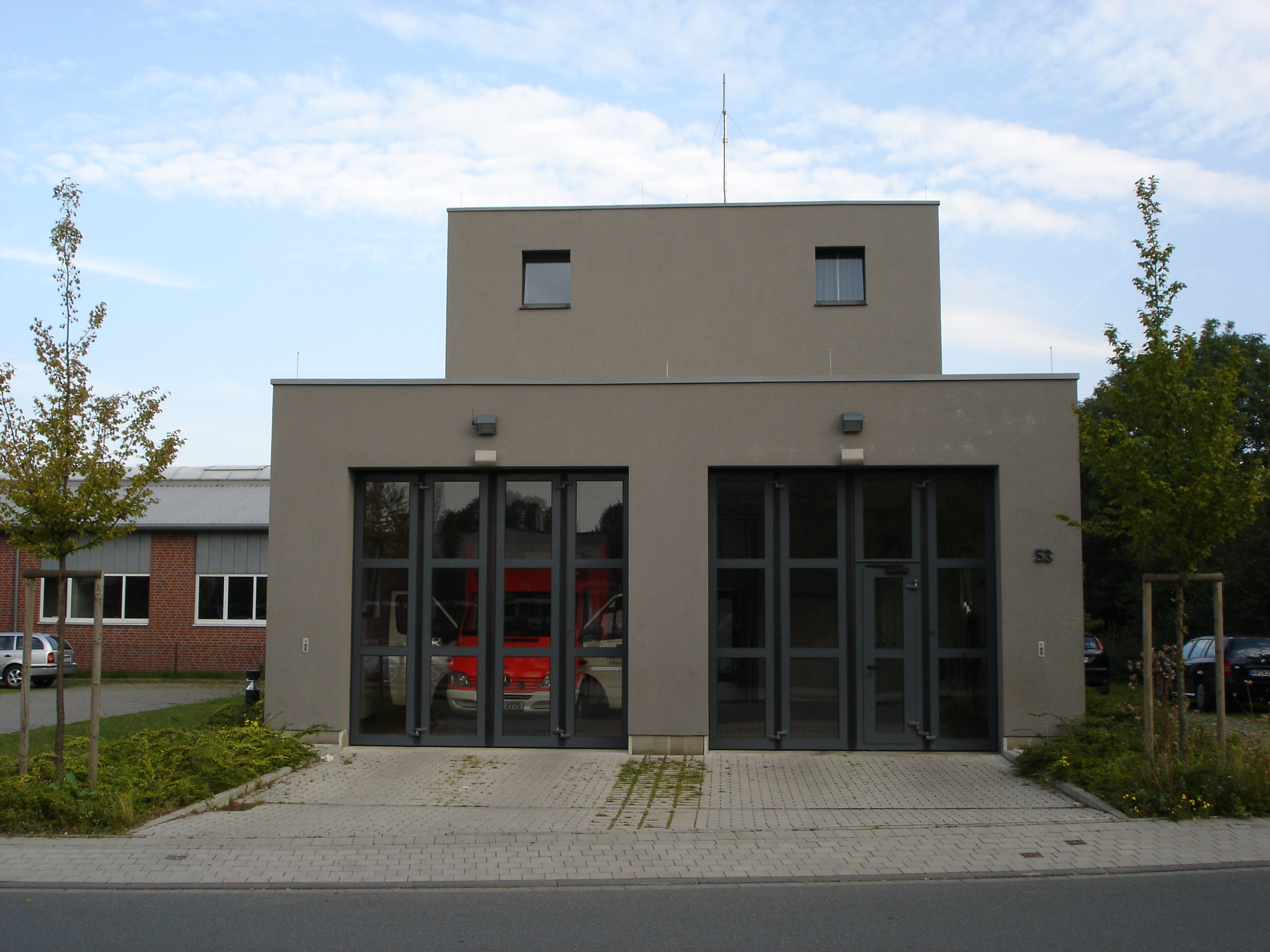 Rettungswache Kemper der Feuerwehr Münster, Münster, Deutschland